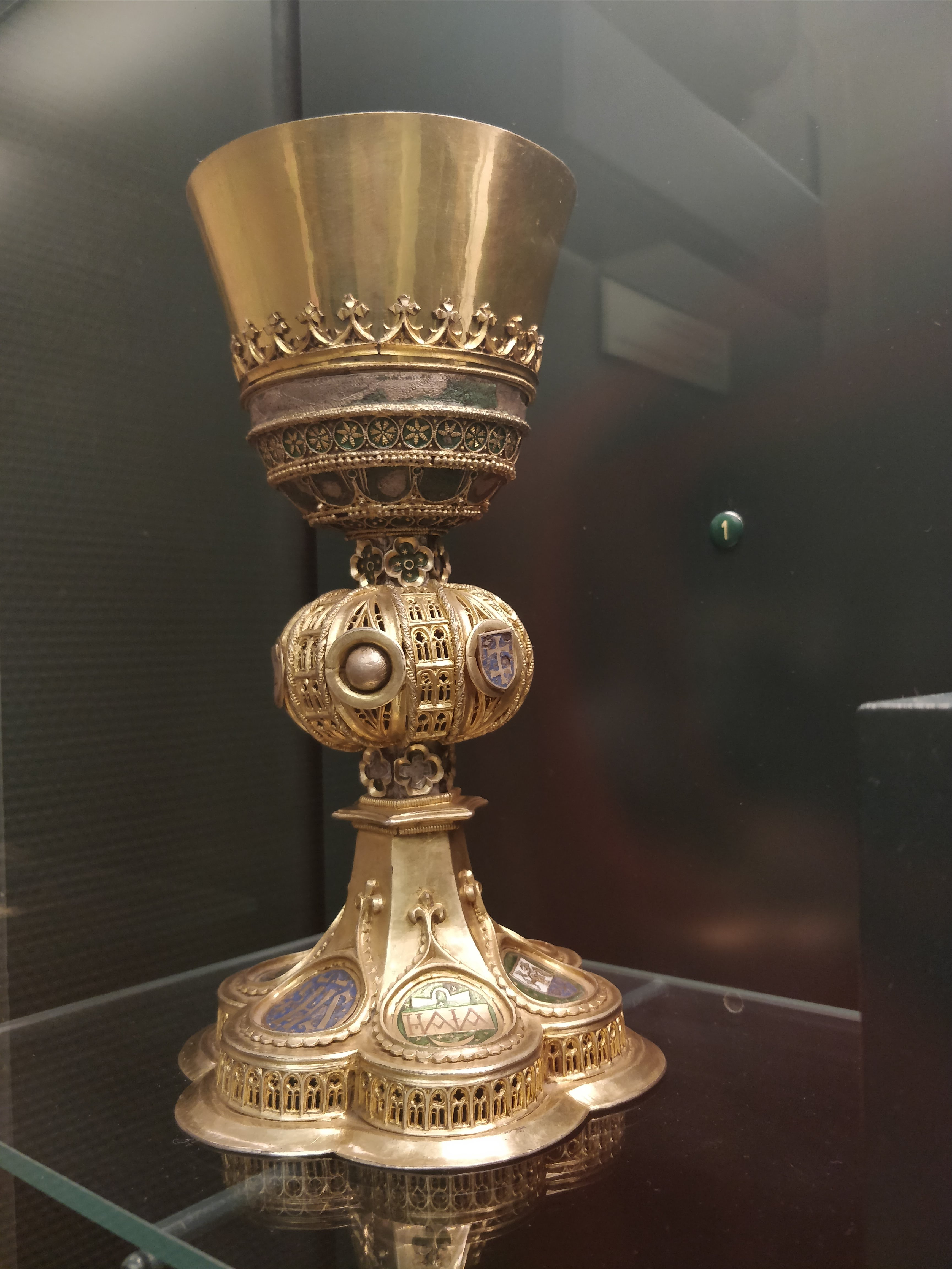 15.százati kehely, jelenleg a Magyar Nemzeti Múzeumban van kiállítva